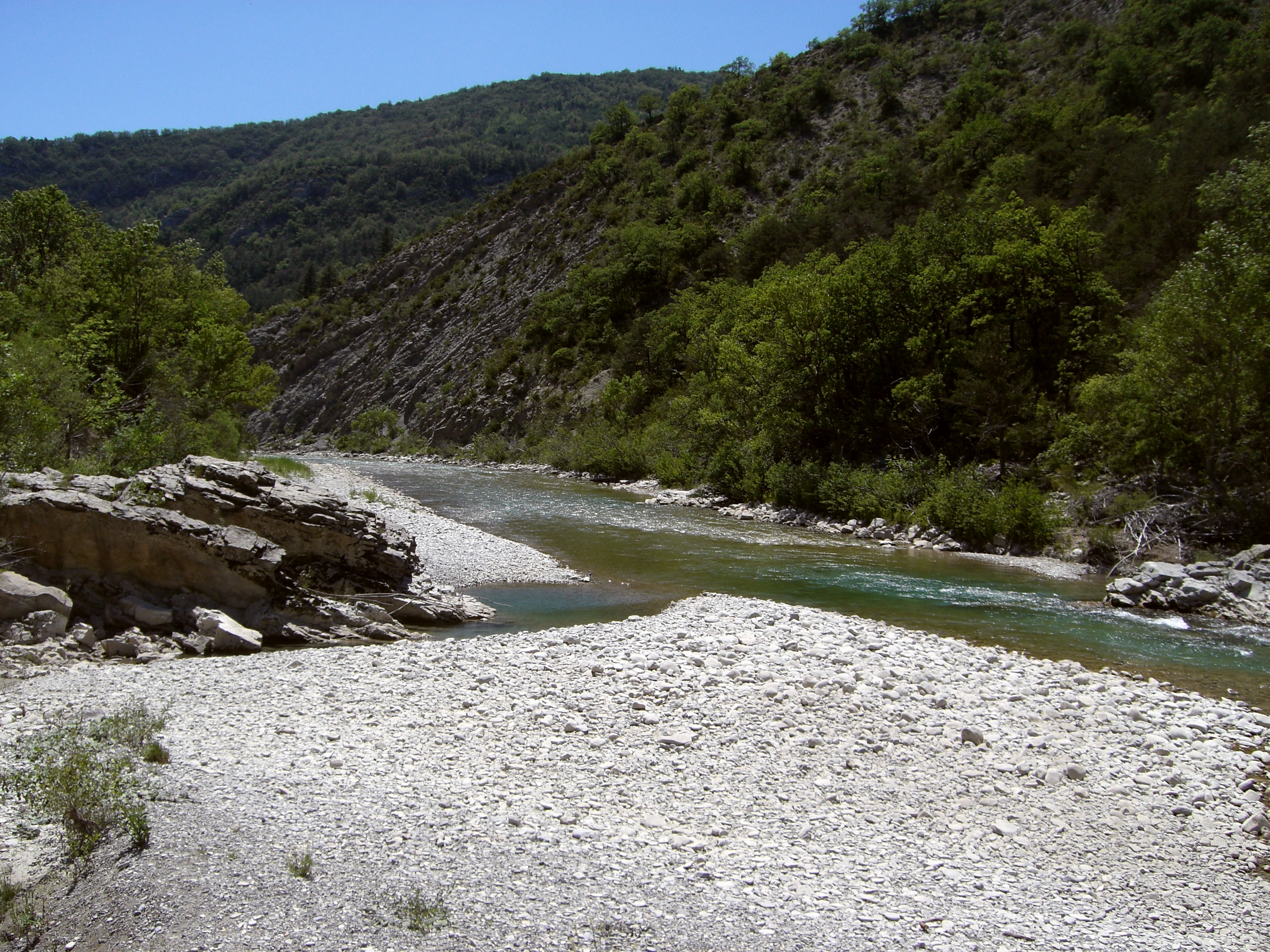 Le Buëch, France